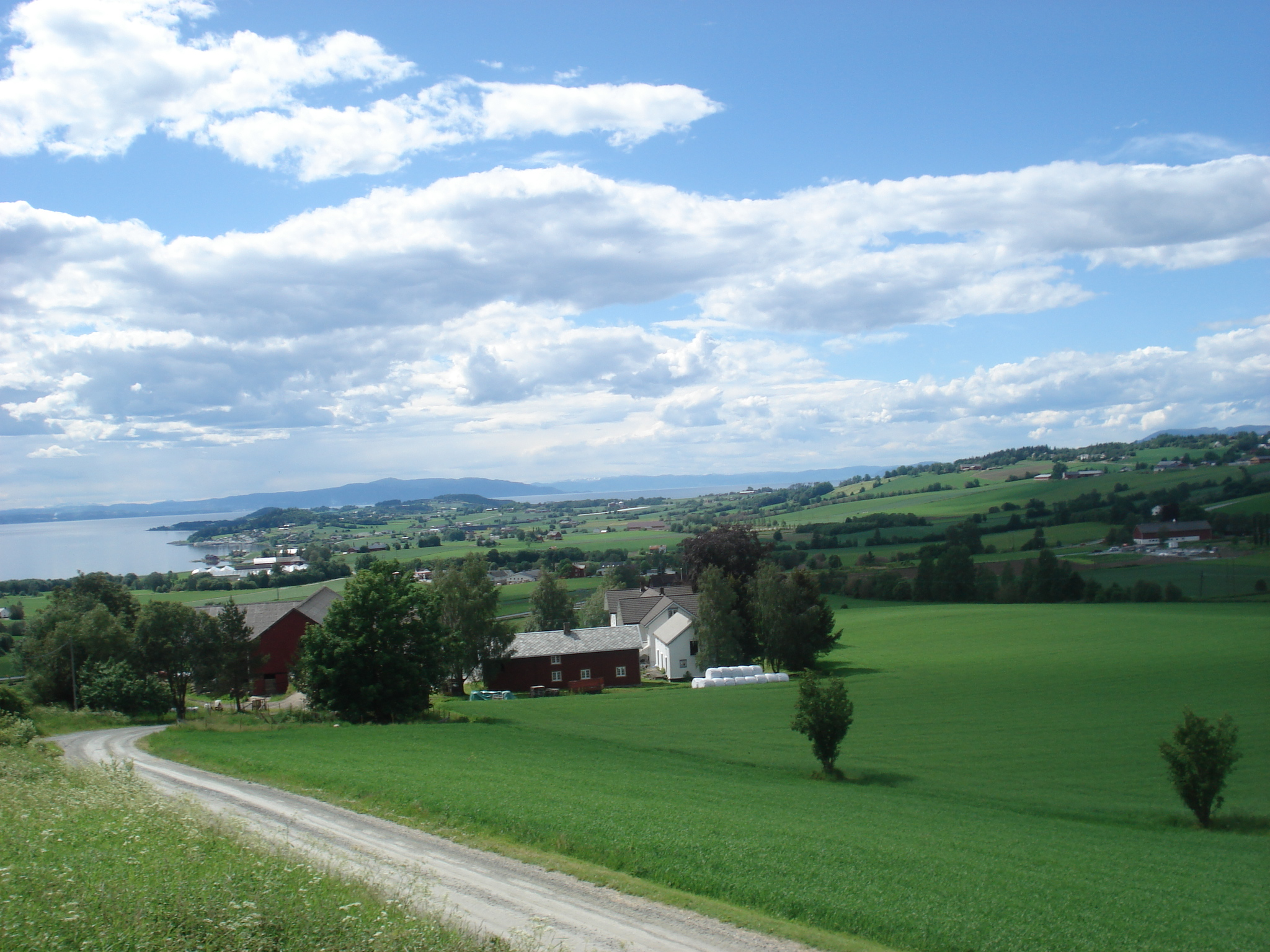 Frosta sett fra Hellan mot Trondheim